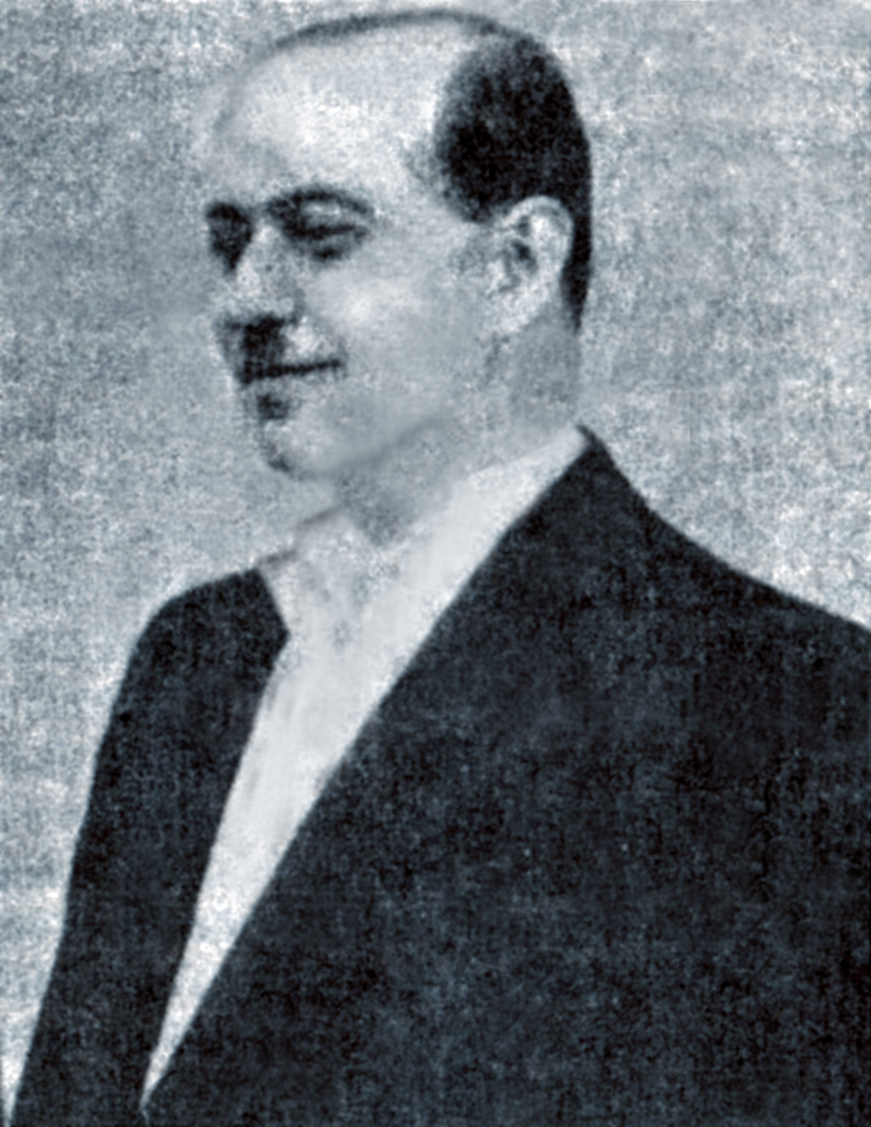 Gheorghe Alexianu nach 1935